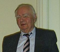 Dieter Biallas, von 1974 bis 1978 Zweiter Bürgermeister der Freien und Hansestadt Hamburg.